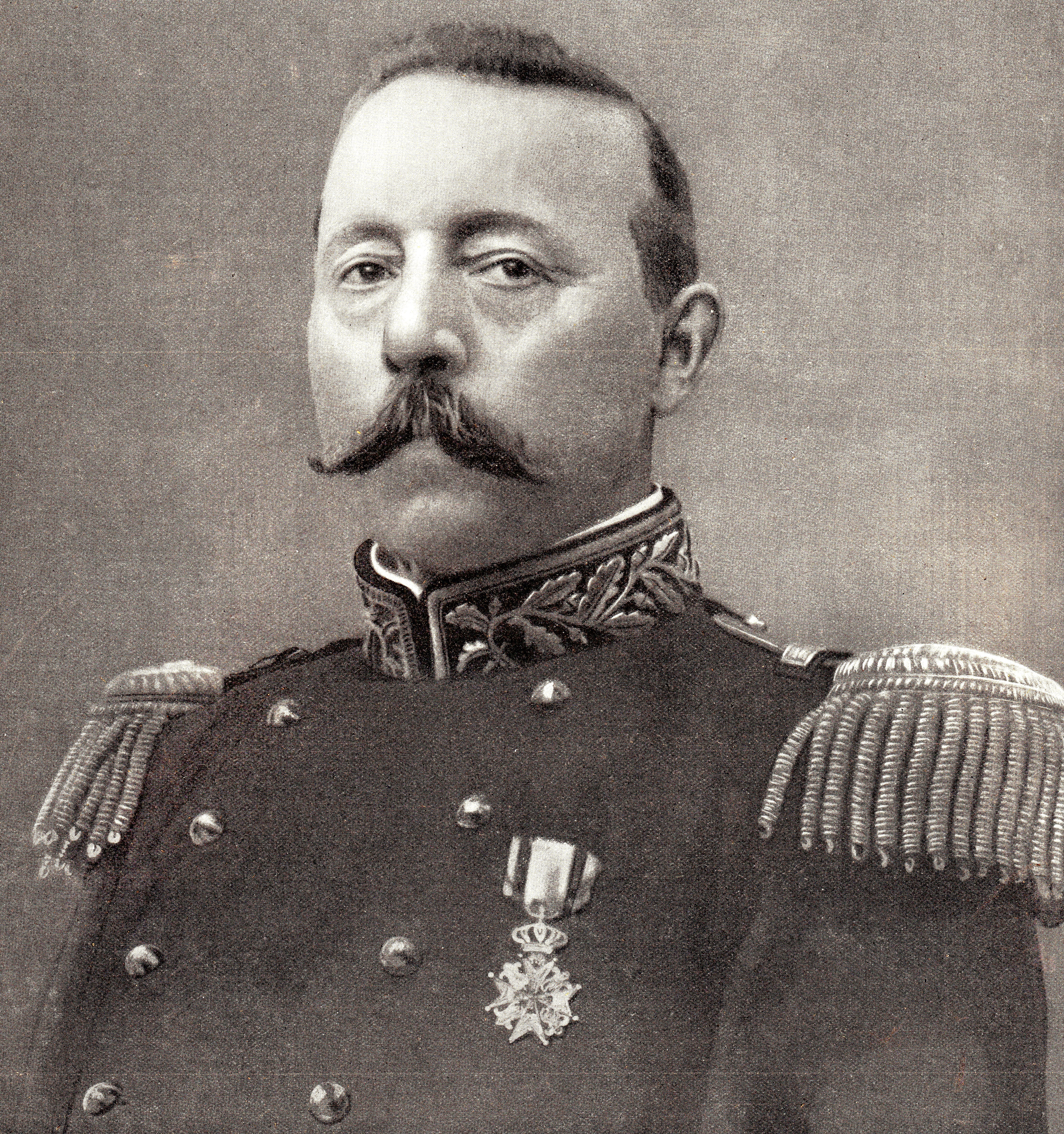 B.R.F. van Vlijmen